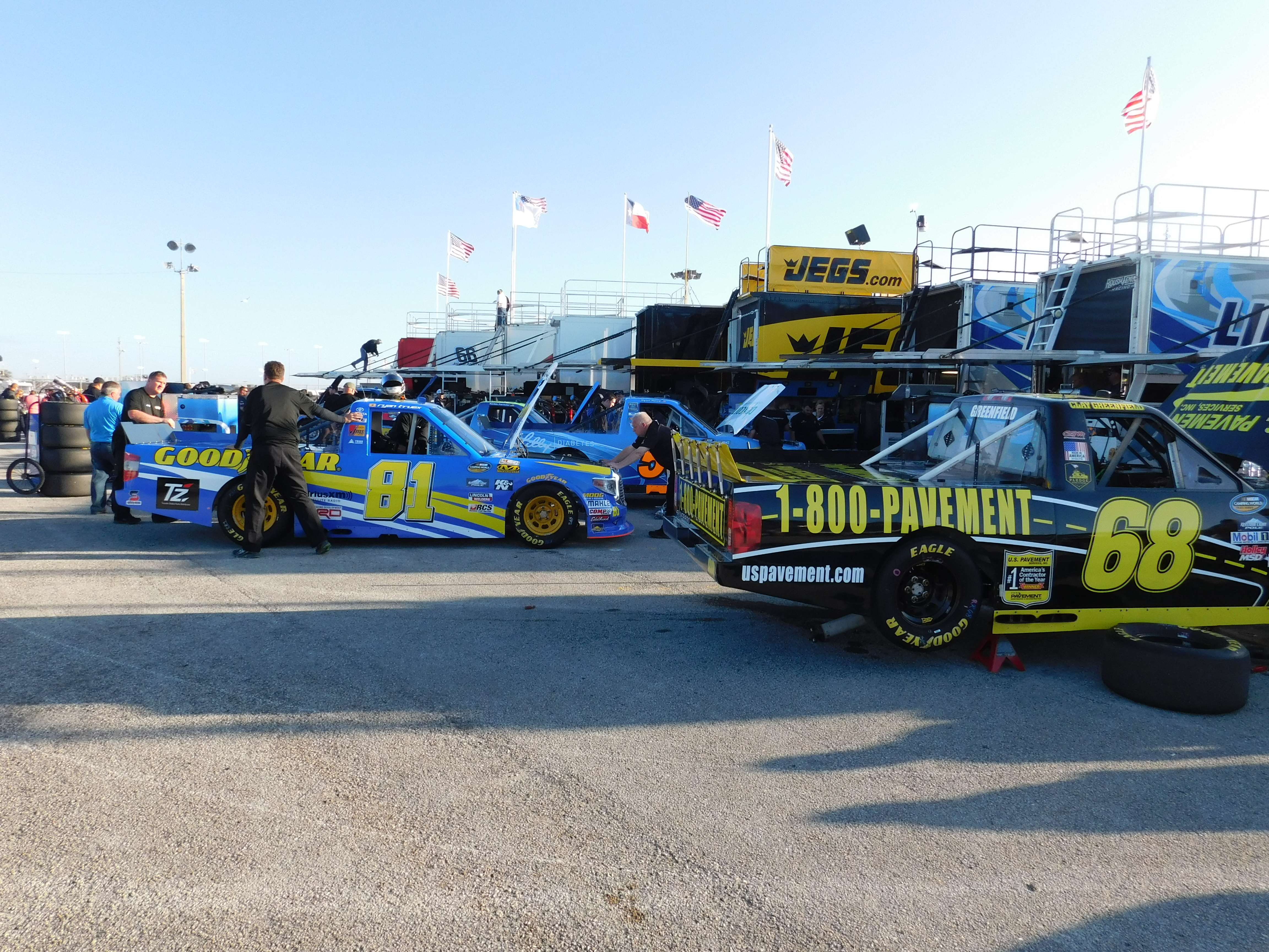 NCWTS garage